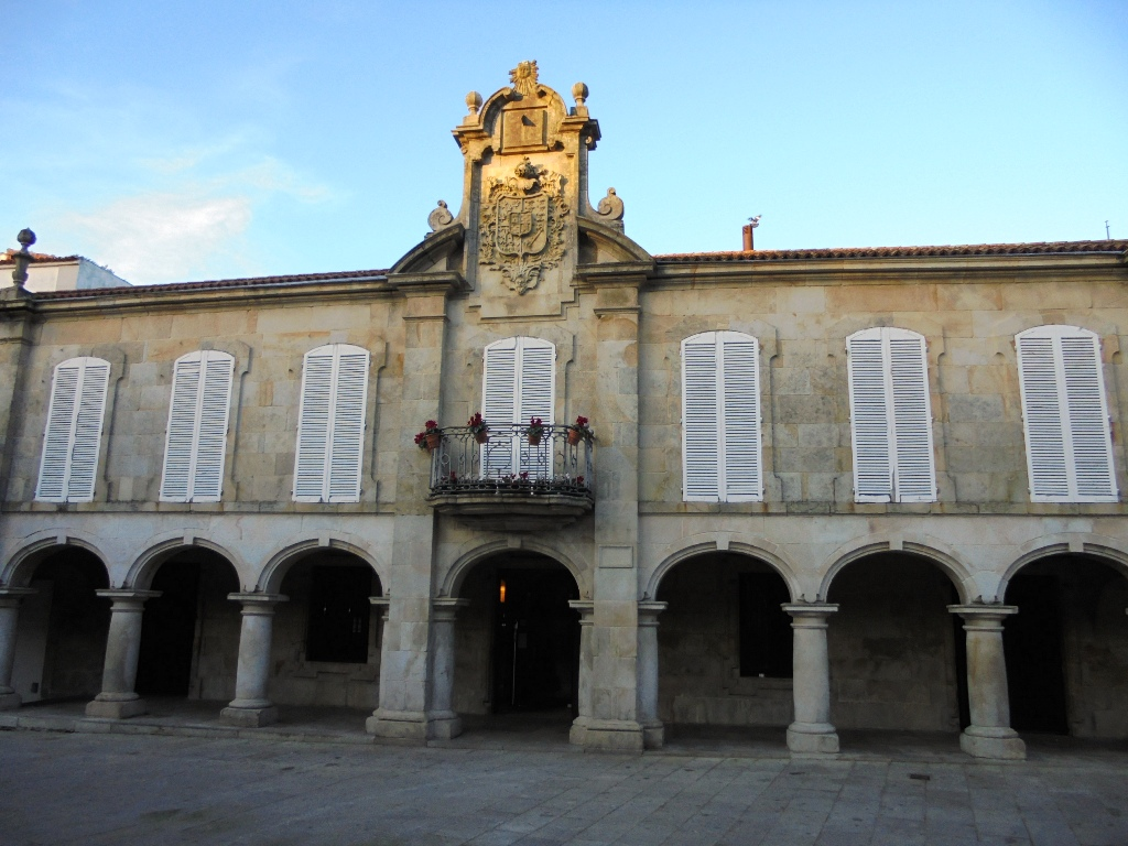 Palacio Barroco de Mugártegui en Pontevedra capital